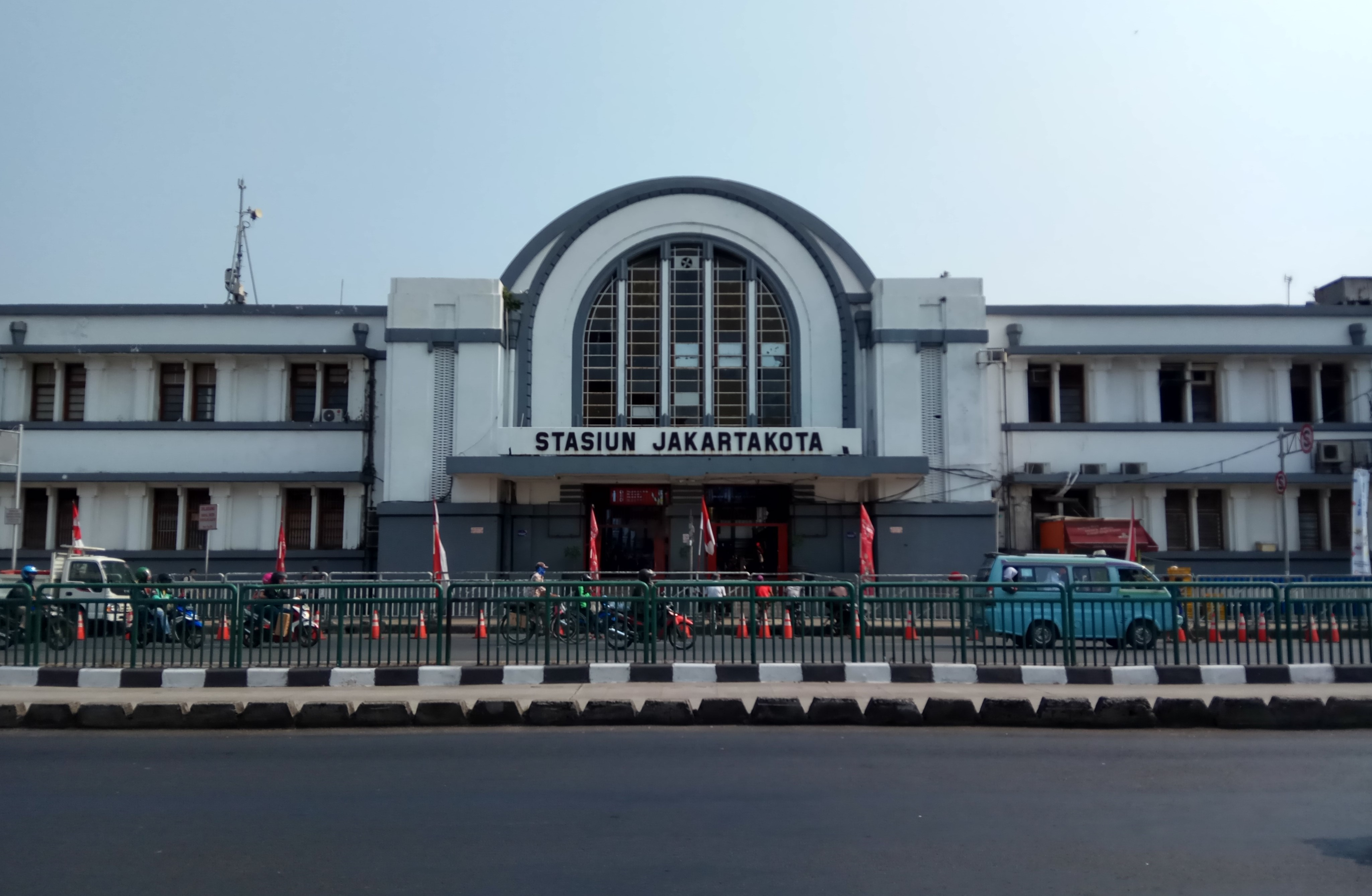 Stasiun Jakartakota 2018